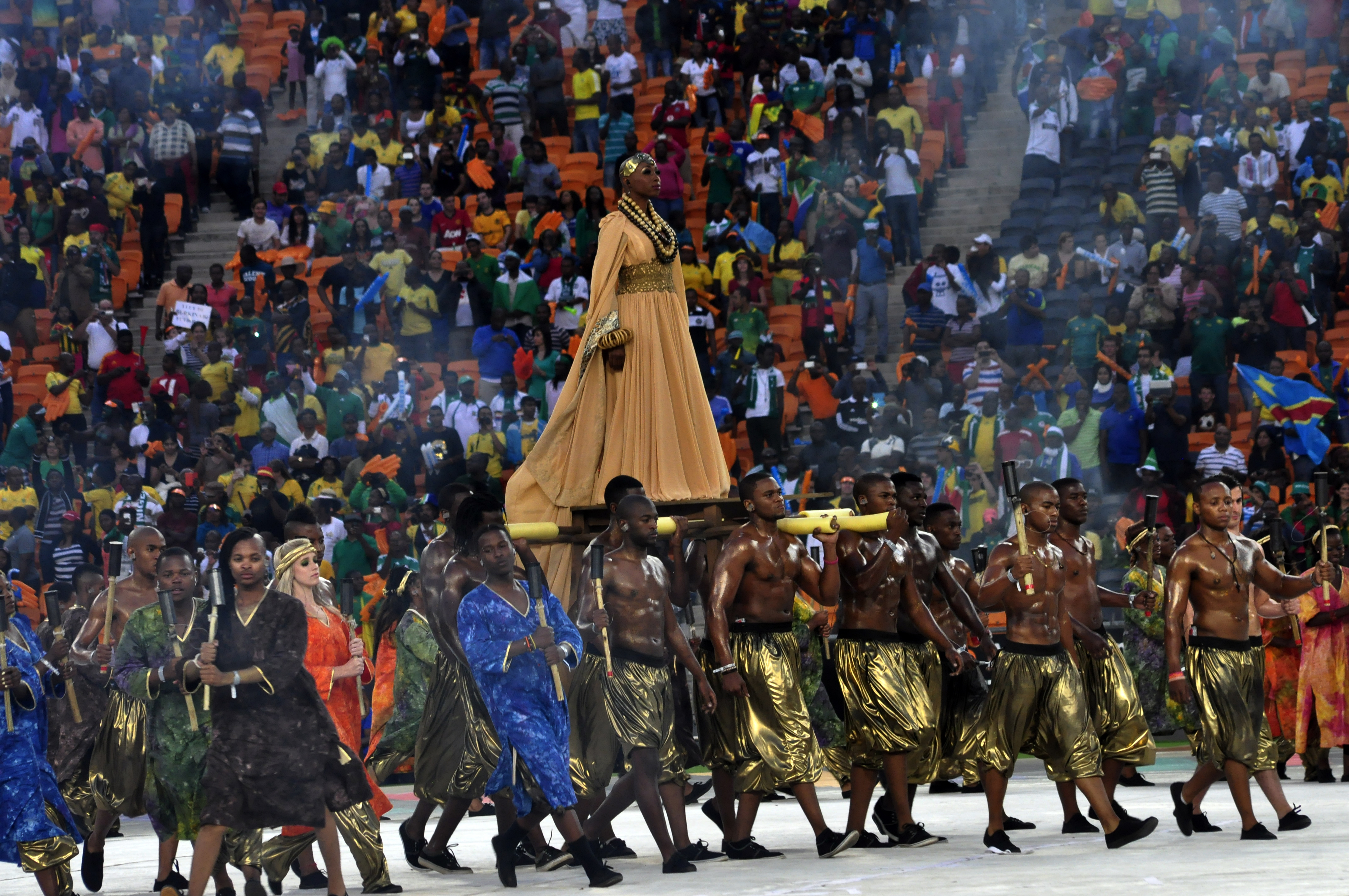 Un groupe d’artistes Sud africains transportant une chanteuse lors de la cérémonie de clôture de la CAN 2013 le 10 février 2013 au SOCCER CITY STADIUM de Johannesburg. This is an image with the theme "Africa on the Move or Transport" from: South Africa